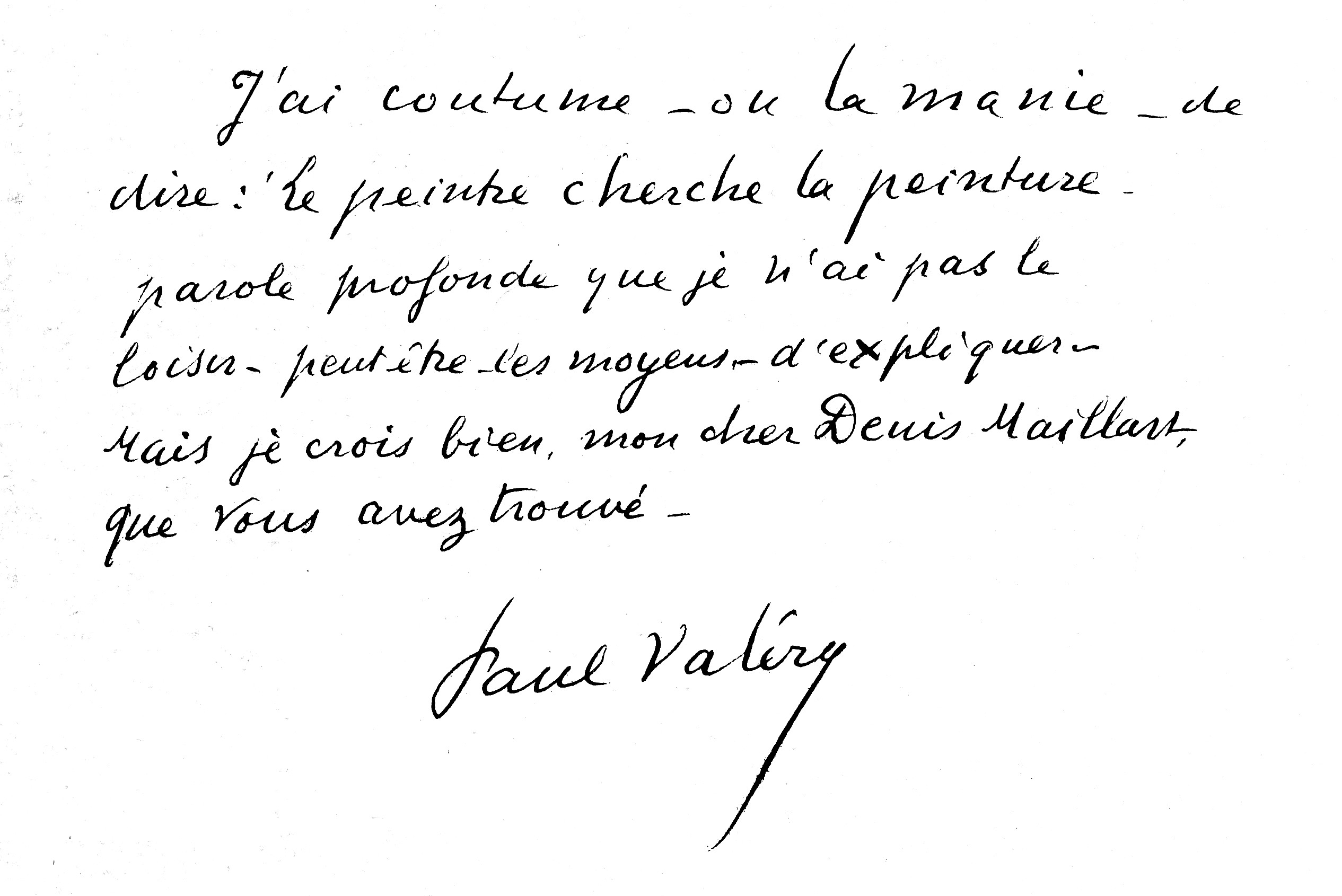 Envoi manuscrit attribué à Paul Valéry à Jean-Denis Maillart vers 1942, localisation inconnue.